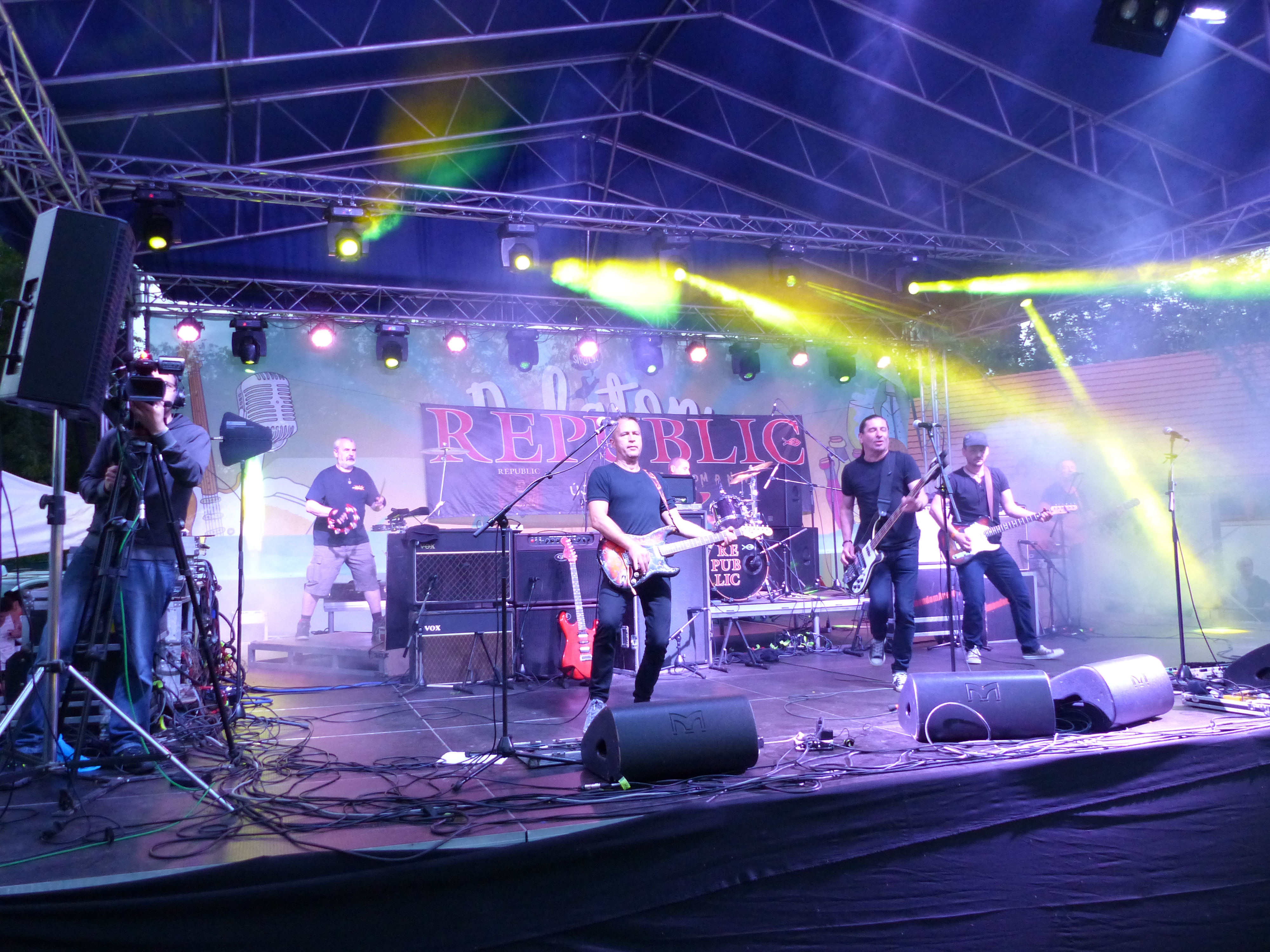 A felvétel 2017. július 2-án, vasárnap este készült a Balaton Fesztiválon, Balatonkenesén. Republic együttes.